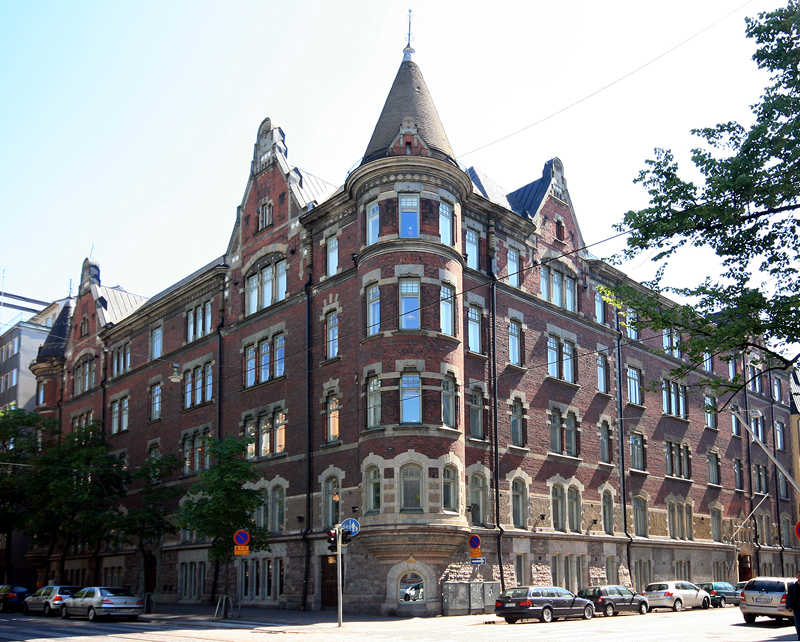 Albertinkatu 23/Bulevardi 30, Helsinki. Built 1898. Architect: Karl Hård af Segerstadt.